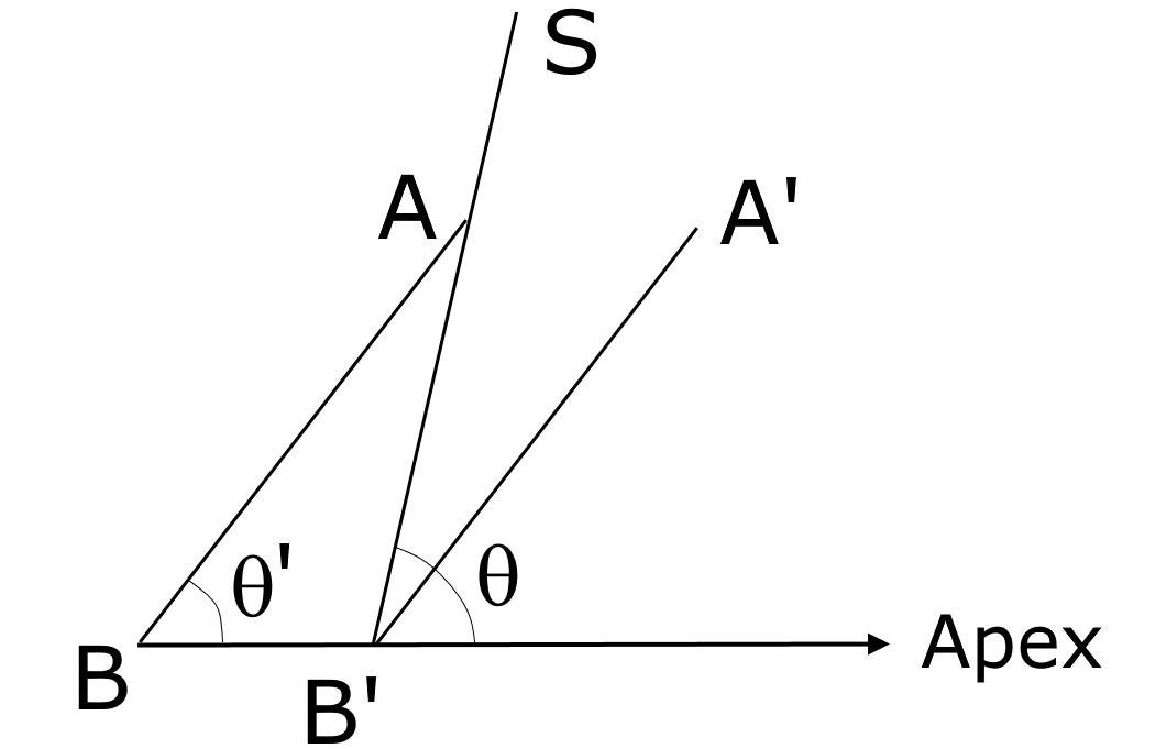 Schemă geometrică pentru calculul aberaţiei luminii.